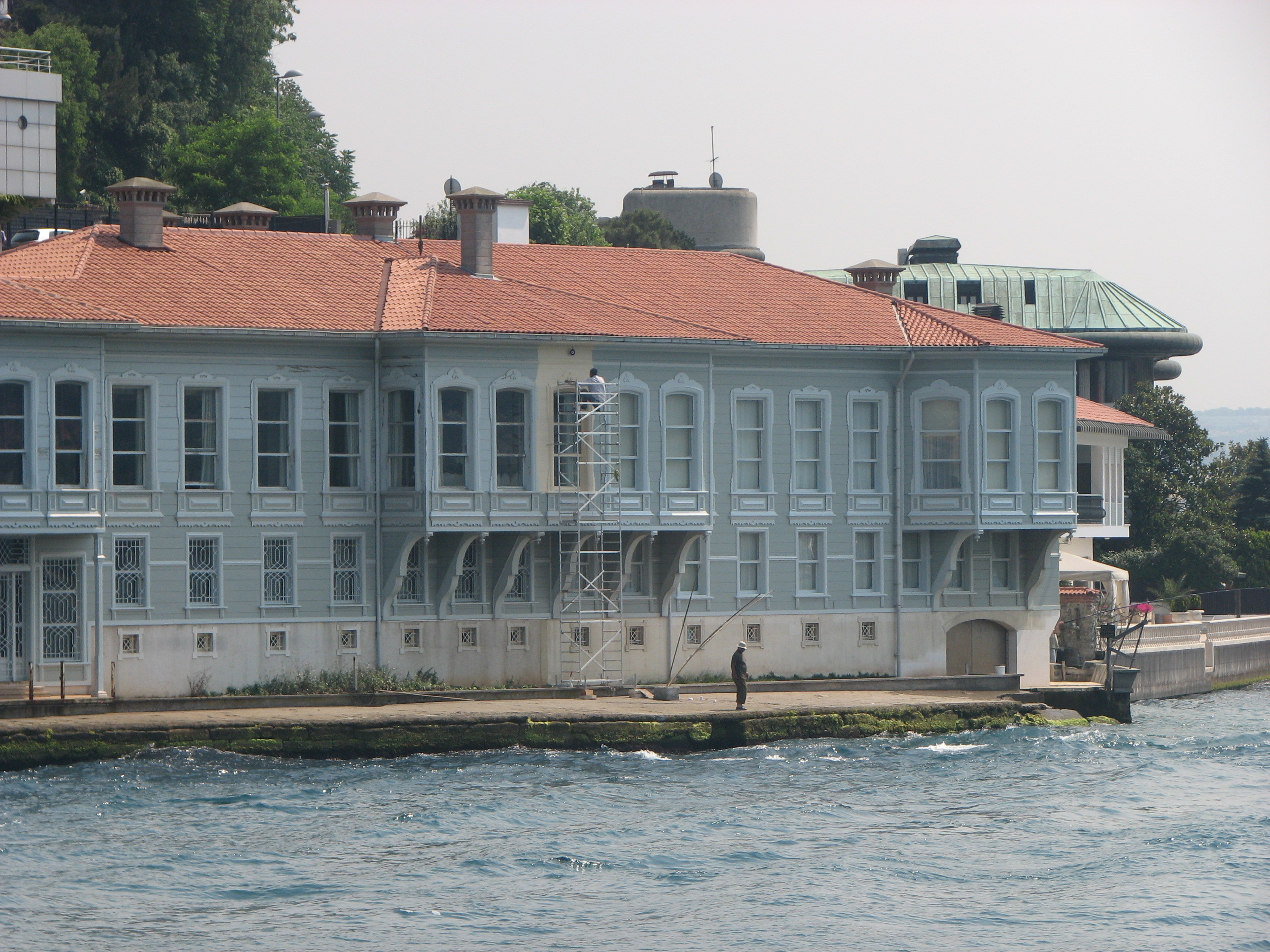 Edib Efendi residence (yali), Istanbul